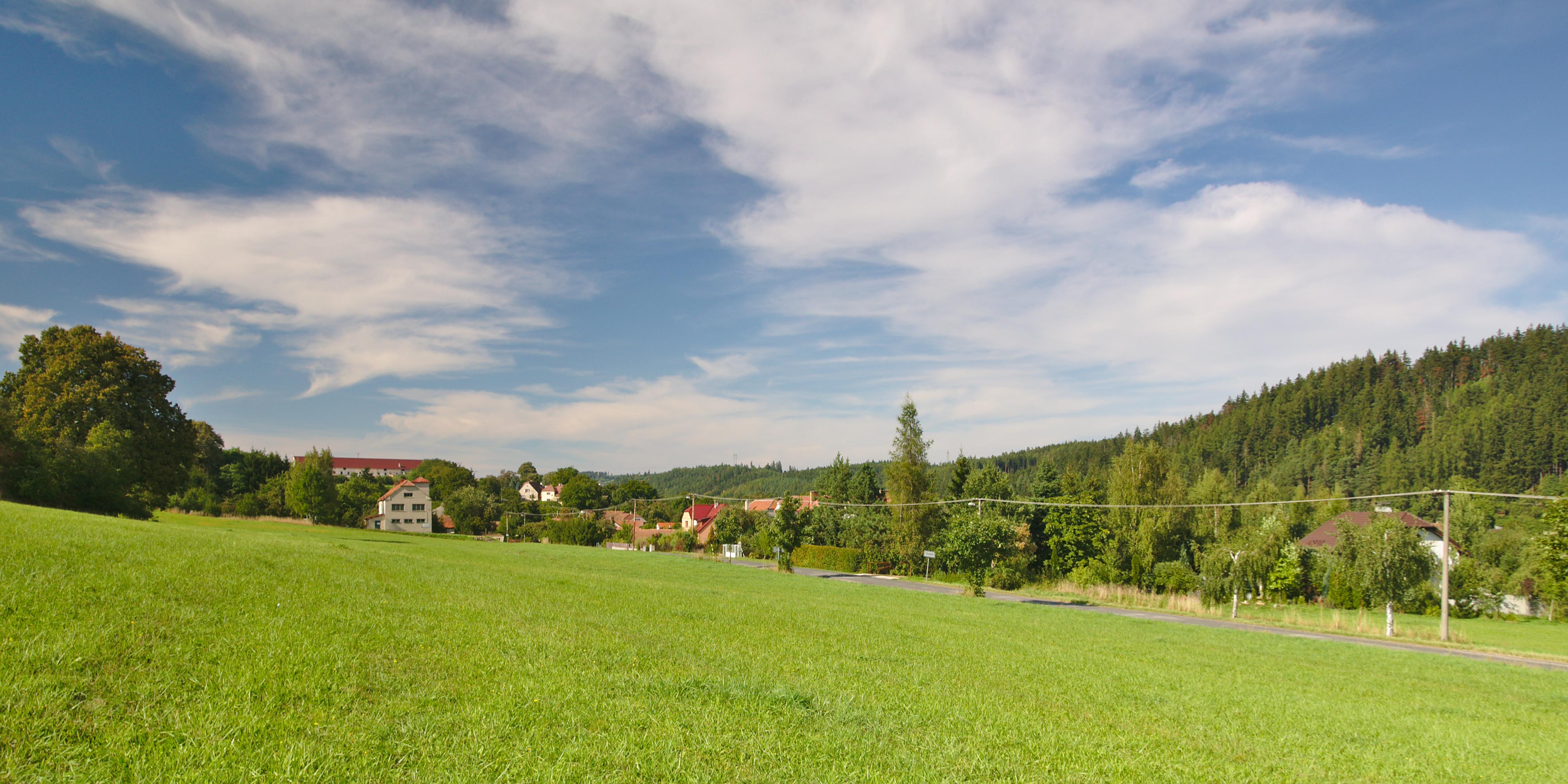 Pohled na obec od jihu, Čunín, Konice, okres Prostějov